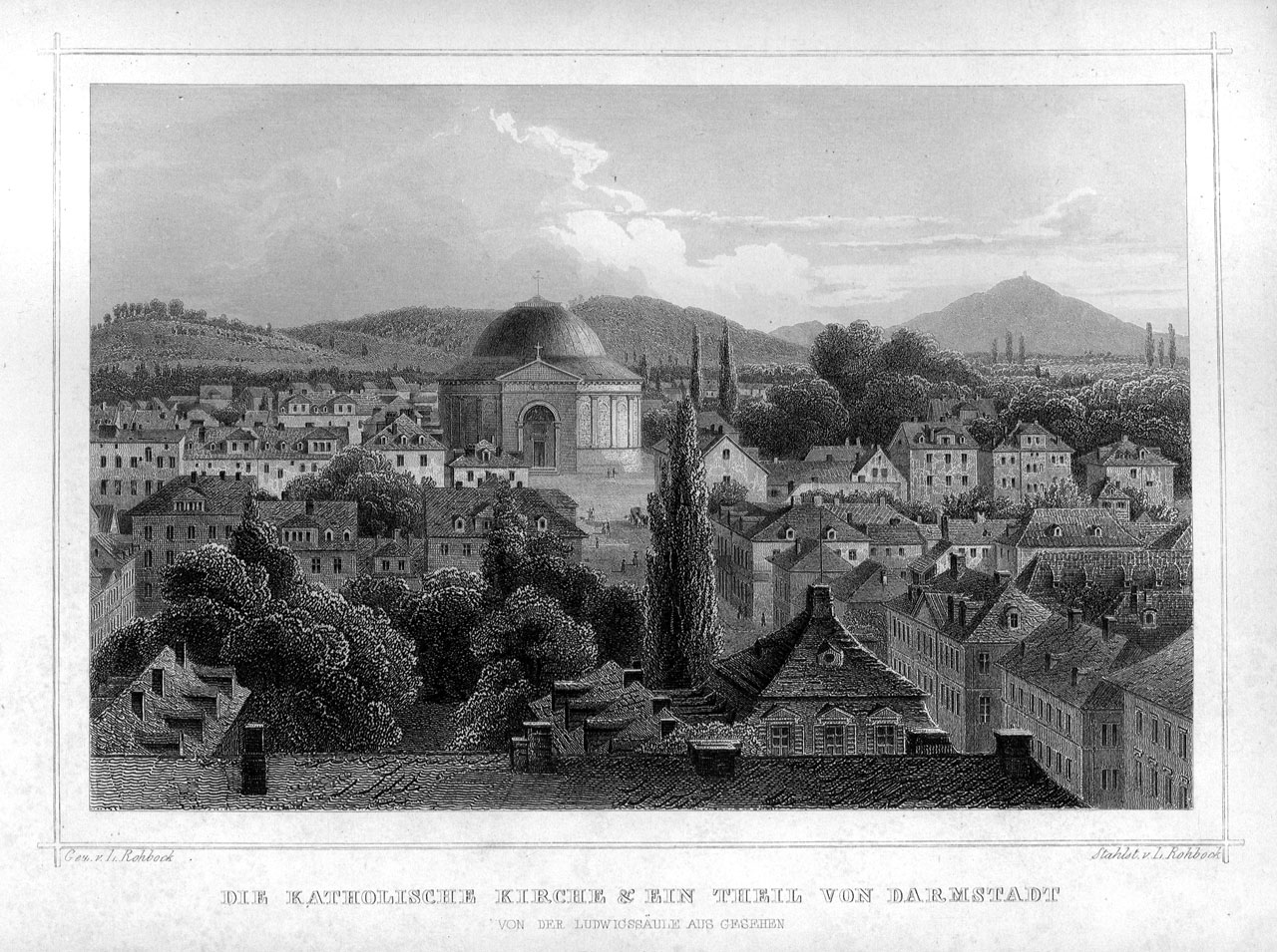 Blick von der Ludwigssäule auf Darmstadt mit Ludwigskirche um 1849